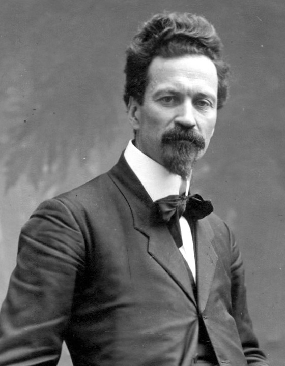 Ritratto fotografico di Cesare Battisti nel 1915.